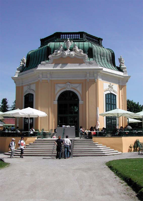 Beschreibung: Das Café-Restaurant Kaiserpavillon im Tiergarten Schönbrunn (Wien) Quelle: Fotografiert am 30.06.2004 Fotograf oder Zeichner: Peter Gerstbach Lizenzstatus: GNU Freie Dokumentationslizenz